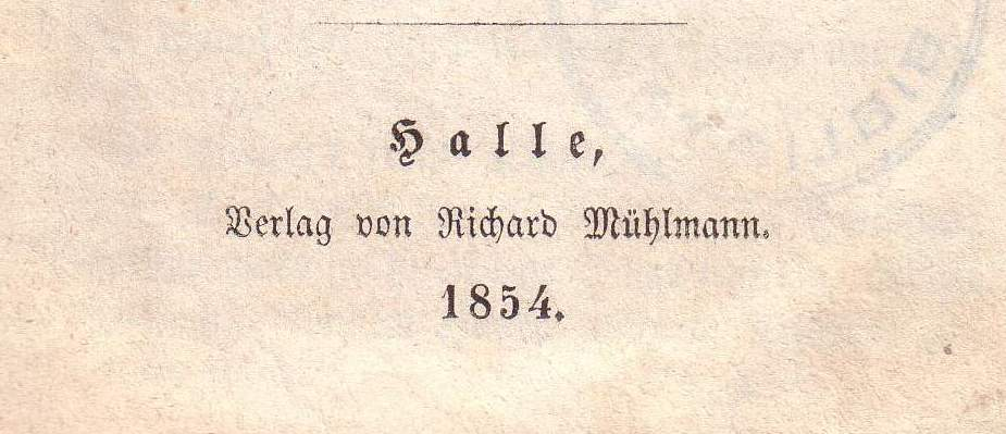 Buch, 1854